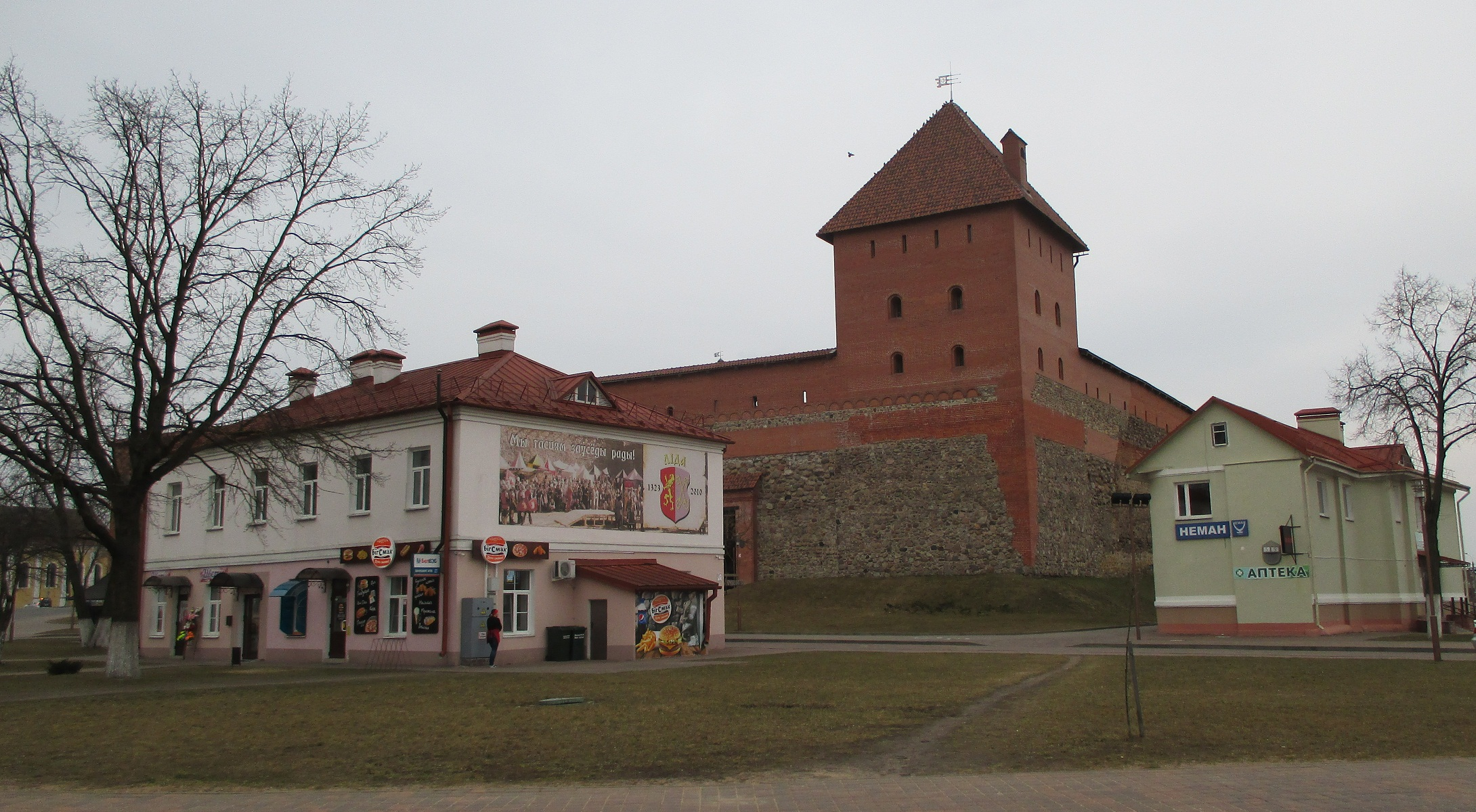 Беларусь, Ліда, вуліца Замкавая